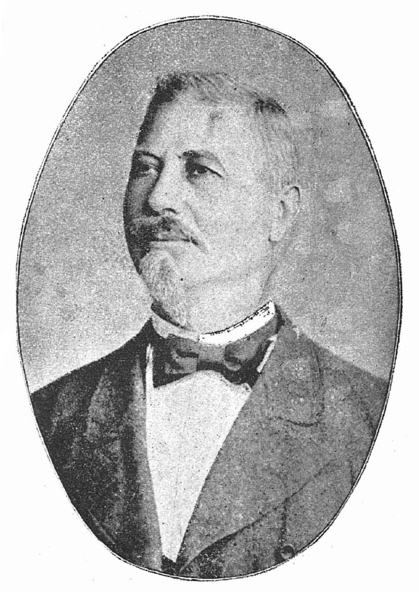 Ion Brezoianu, portret fotografic din sec. XIX